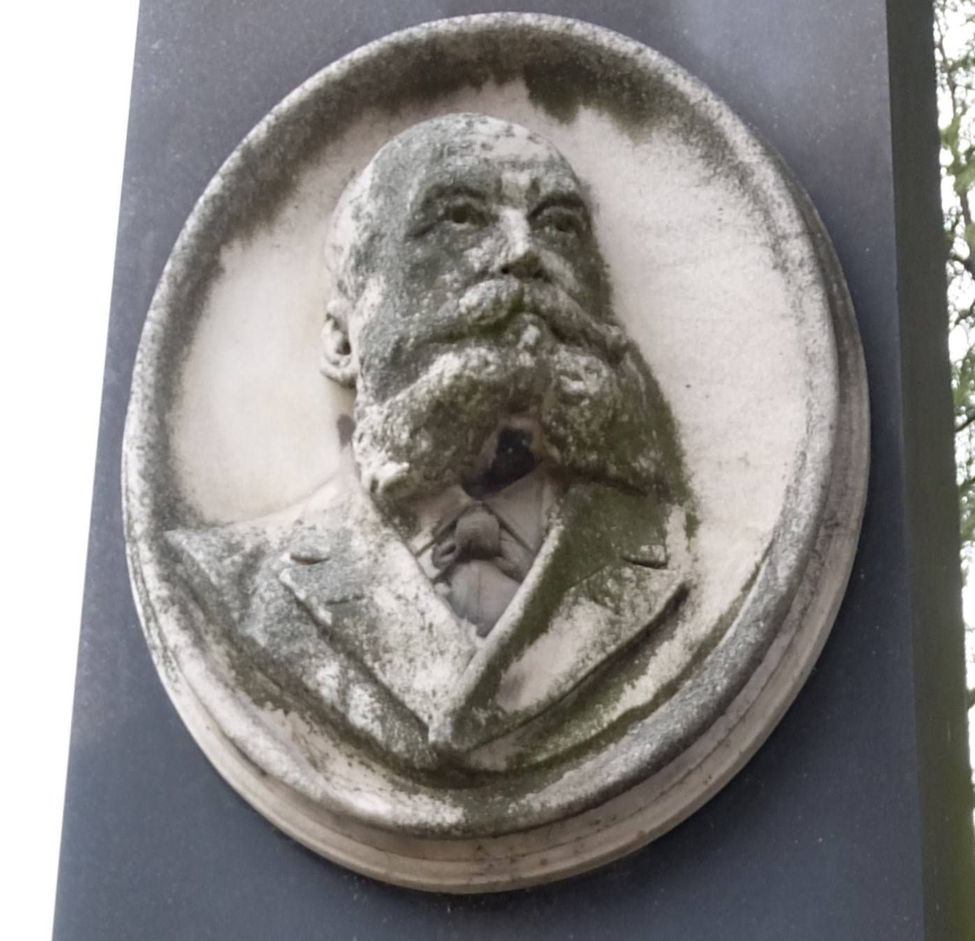 Portét Eduarda Hamburgera na rodinné hrobce na Židovském hřbitově v Olomouci (Ústřední hřbitov Neředín)